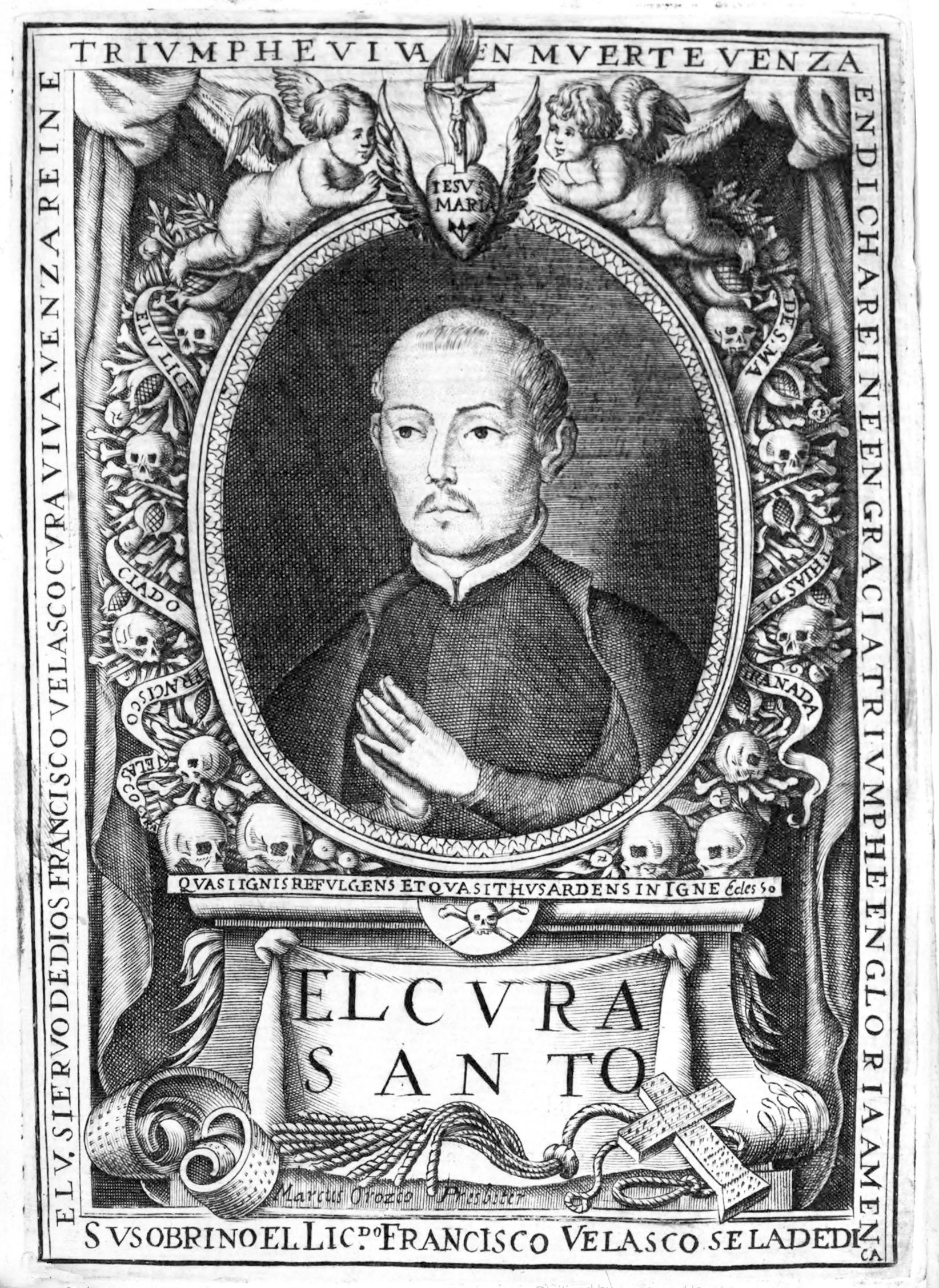 Retrato de Francisco Velasco, el cura santo de San Matías publicado en el libro Molina Almaguer y Guzmán, Miguel José (1674). Vida del venerable siervo y sacerdote de Dios Francisco Velasco, cura de la iglesia parroquial de S. Matias de la ciudad de Granada. Granada: Imprenta de Francisco de Ochoa.